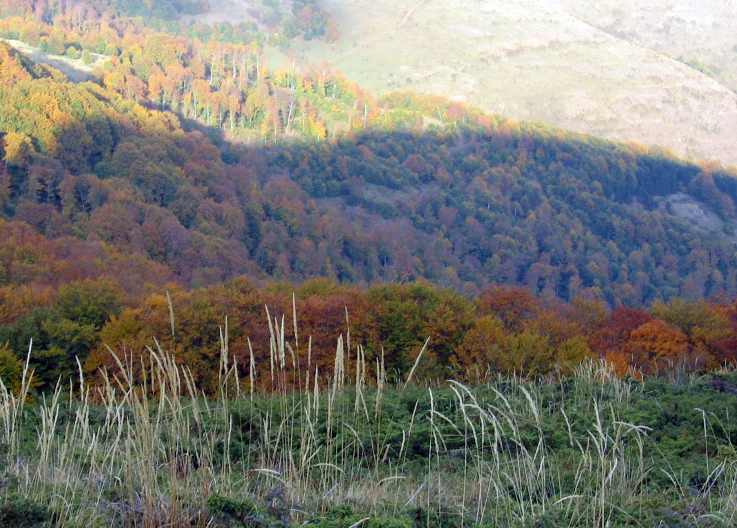 Stara planina - Midzor